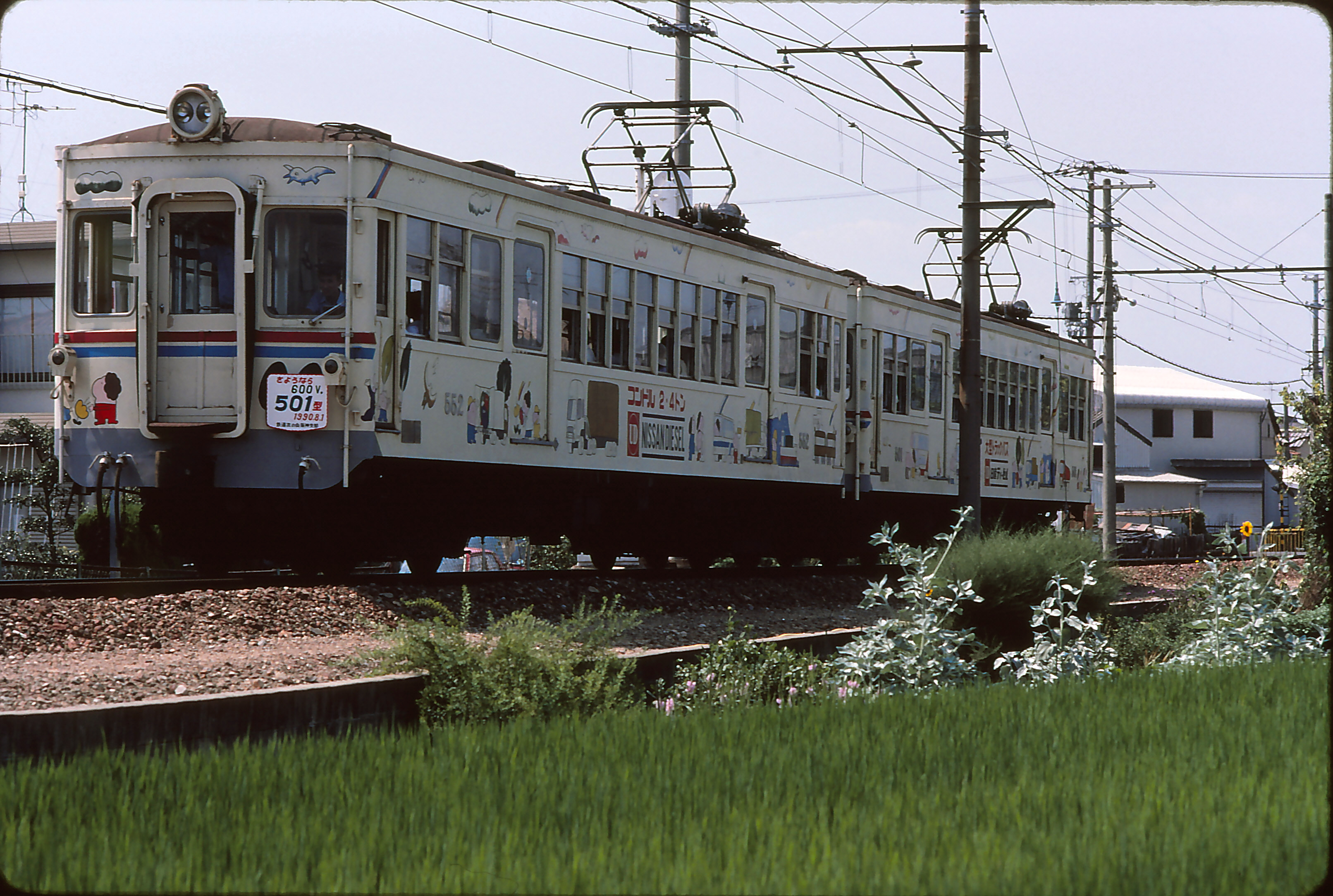 水間鉄道水間線501形